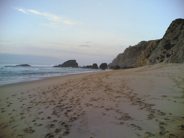 Praia da adraga, Sintra, Portugal